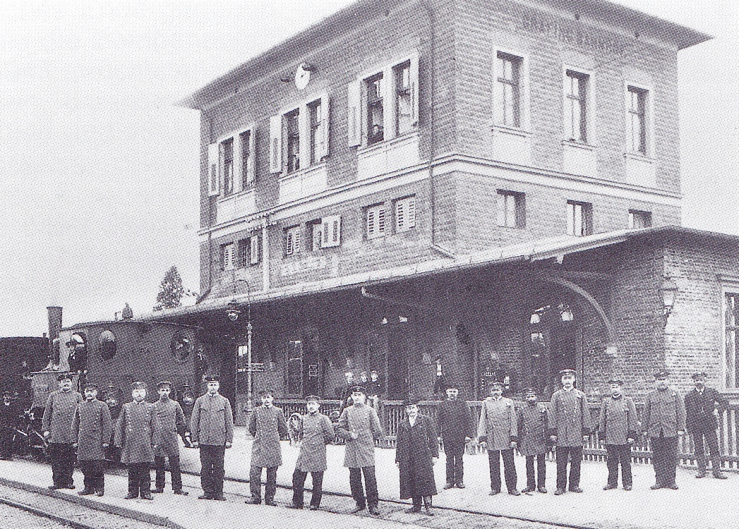 Empfangsgebäude des Bahnhofs Grafing von der Gleisseite, links die Lok 899 „Hohenstadt“ der Bayerischen Gattung D VII.